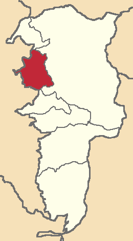 Mapa localizacor del cantón en Bolívar, Ecuador